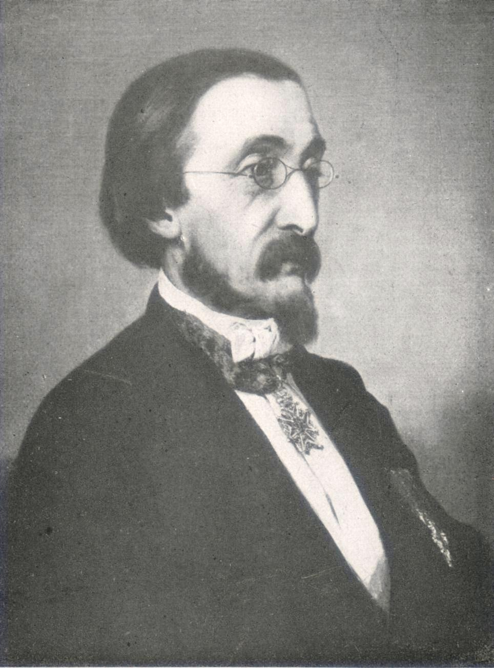 Carl Friedrich Ludwig Mathies, SW-Reproduktion eines Gemäldes, das im Original im Deutschen Versicherungsmuseum hängt.